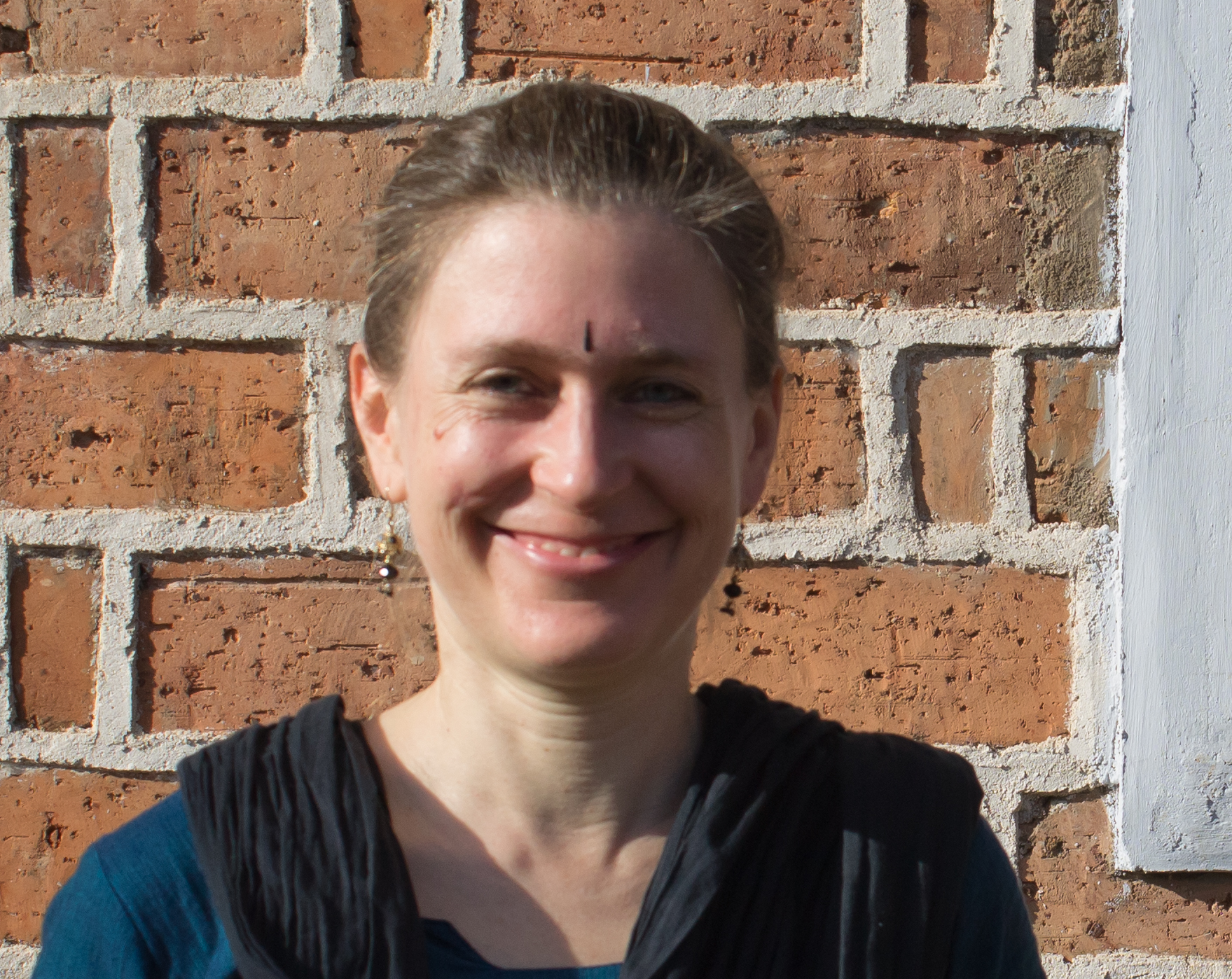 തൂബിങ്ങൺ സർവ്വകലാശാലയിലെ ഇന്തോളജി അദ്ധ്യാപികയായ ഹൈകെ മോസർ